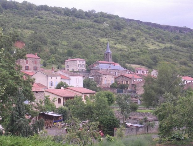 Grenier montgon : le village de Grenier